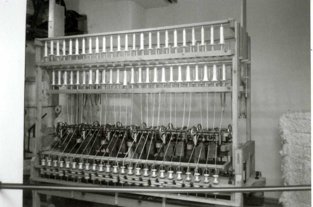 Noch eine Waterframe, diesmal in der Originalgröße für die Kinderarbeit